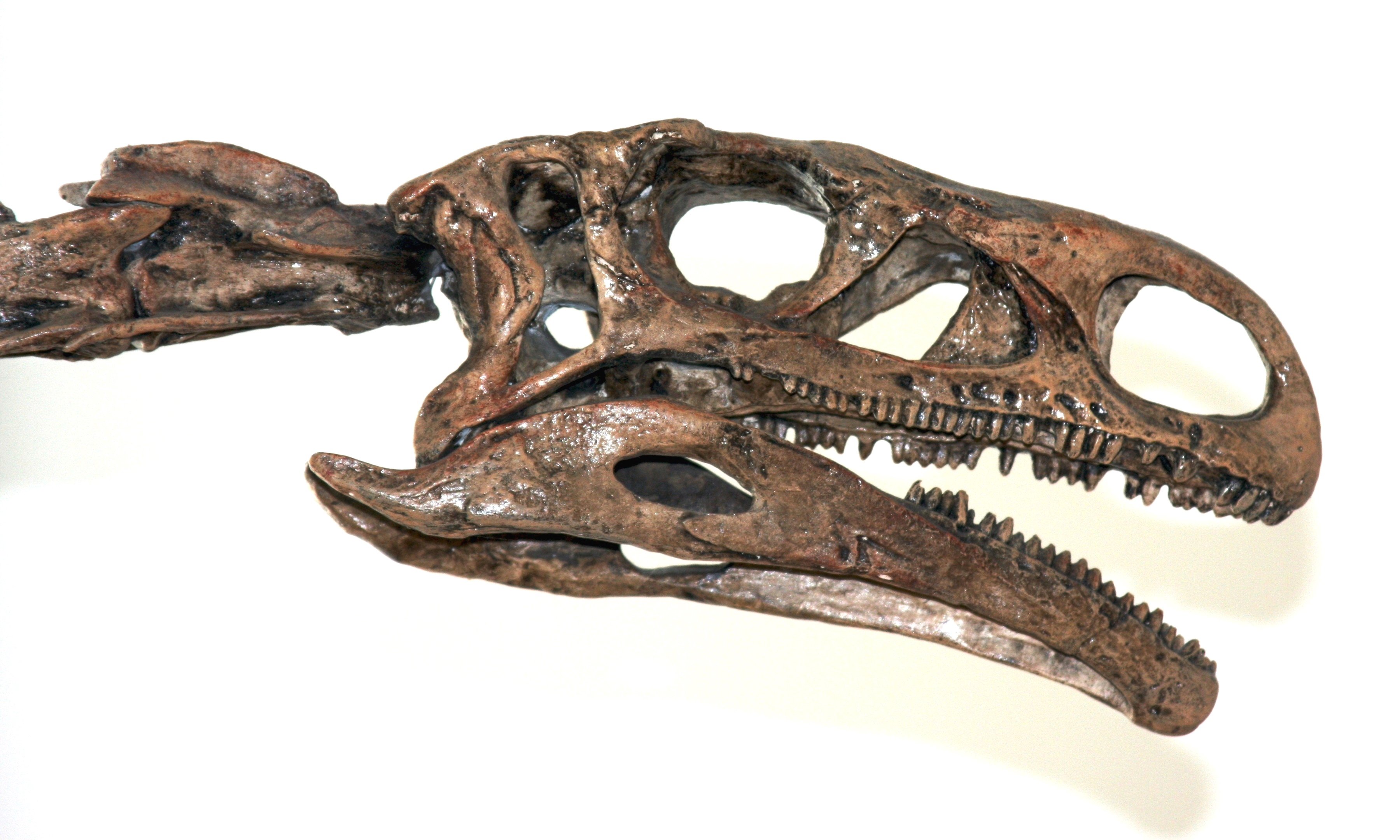 Plateosaurus skull cast, Toronto